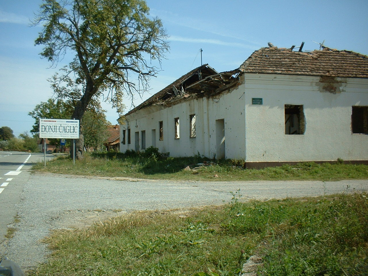 Acceso a Donji Čaglić.